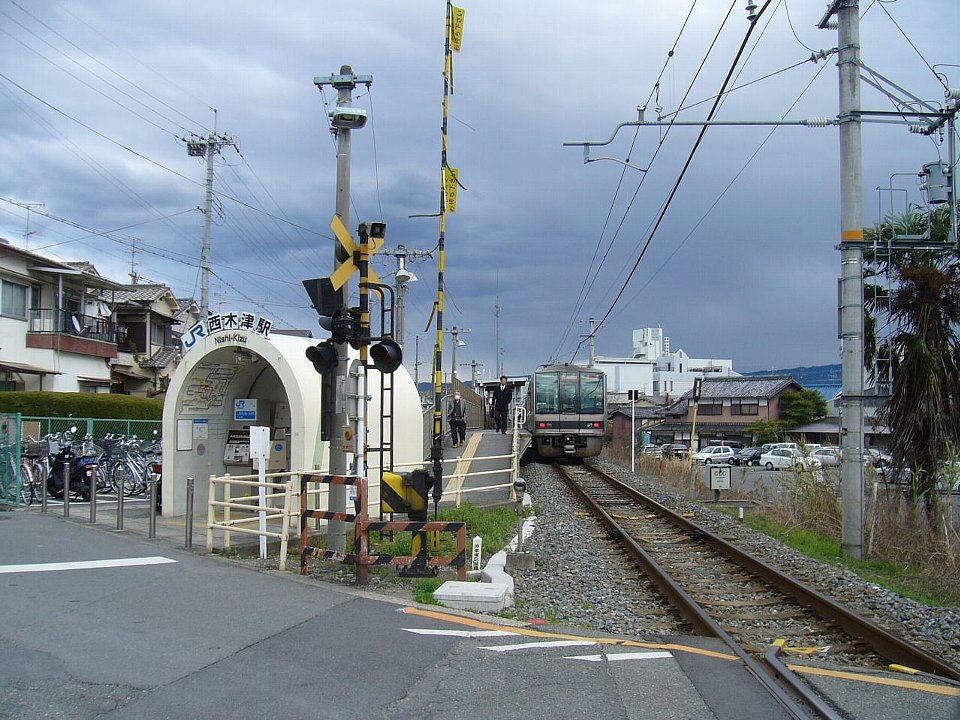 西木津駅